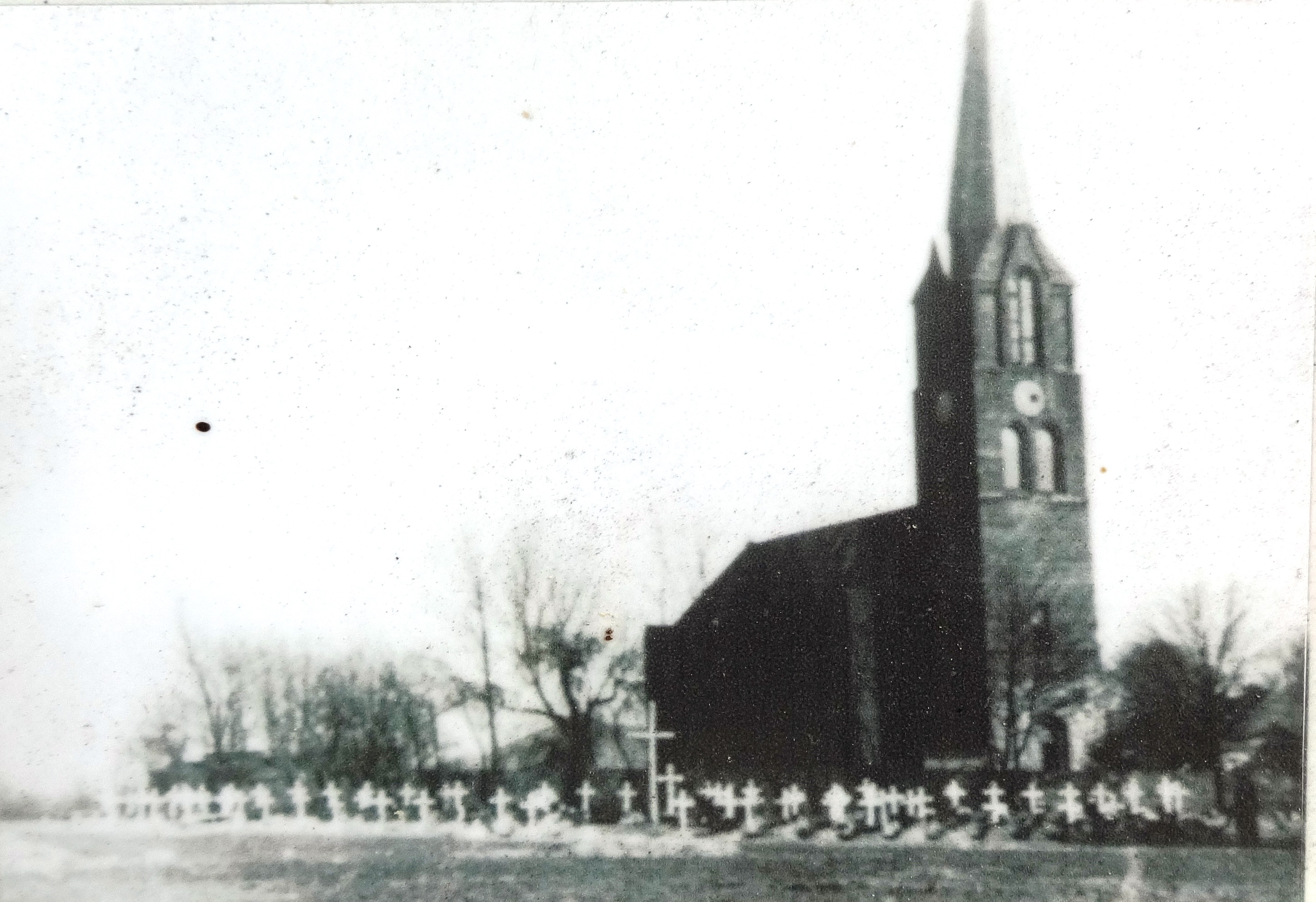 Die neuromanische Saalkirche in Niederjesar entstand 1859 nach Plänen von Friedrich-August Stüler. Im Zweiten Weltkrieg wurde der Turm gesprengt und das Bauwerk verfiel. Nach der Wende wurde die Kirche gesichert, instandgesetzt und umgebaut. Sie dient seit 2002 als kommunales und kirchliches Zentrum.